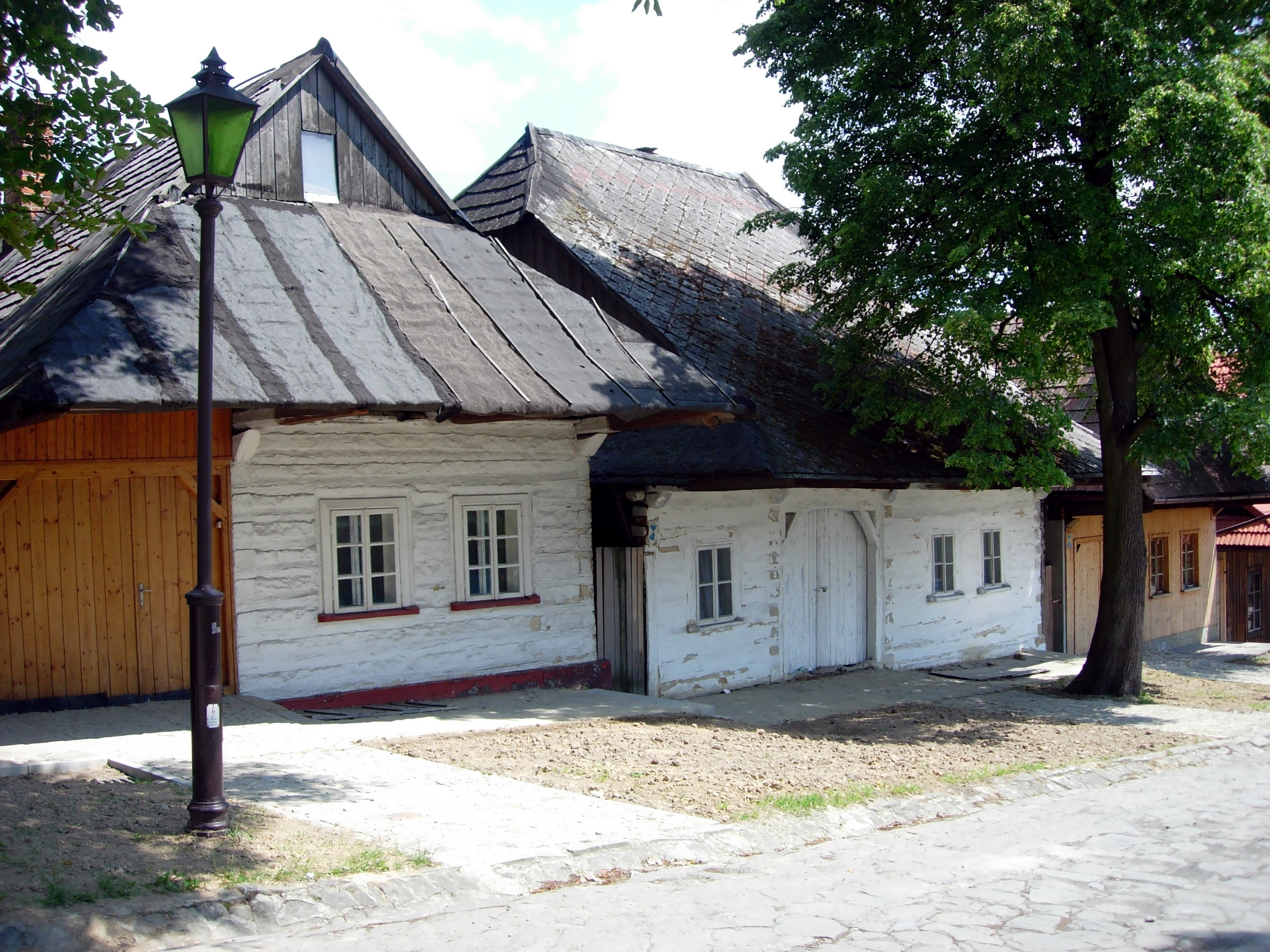 Drewniana zabudowa na Rynku w Lanckoronie